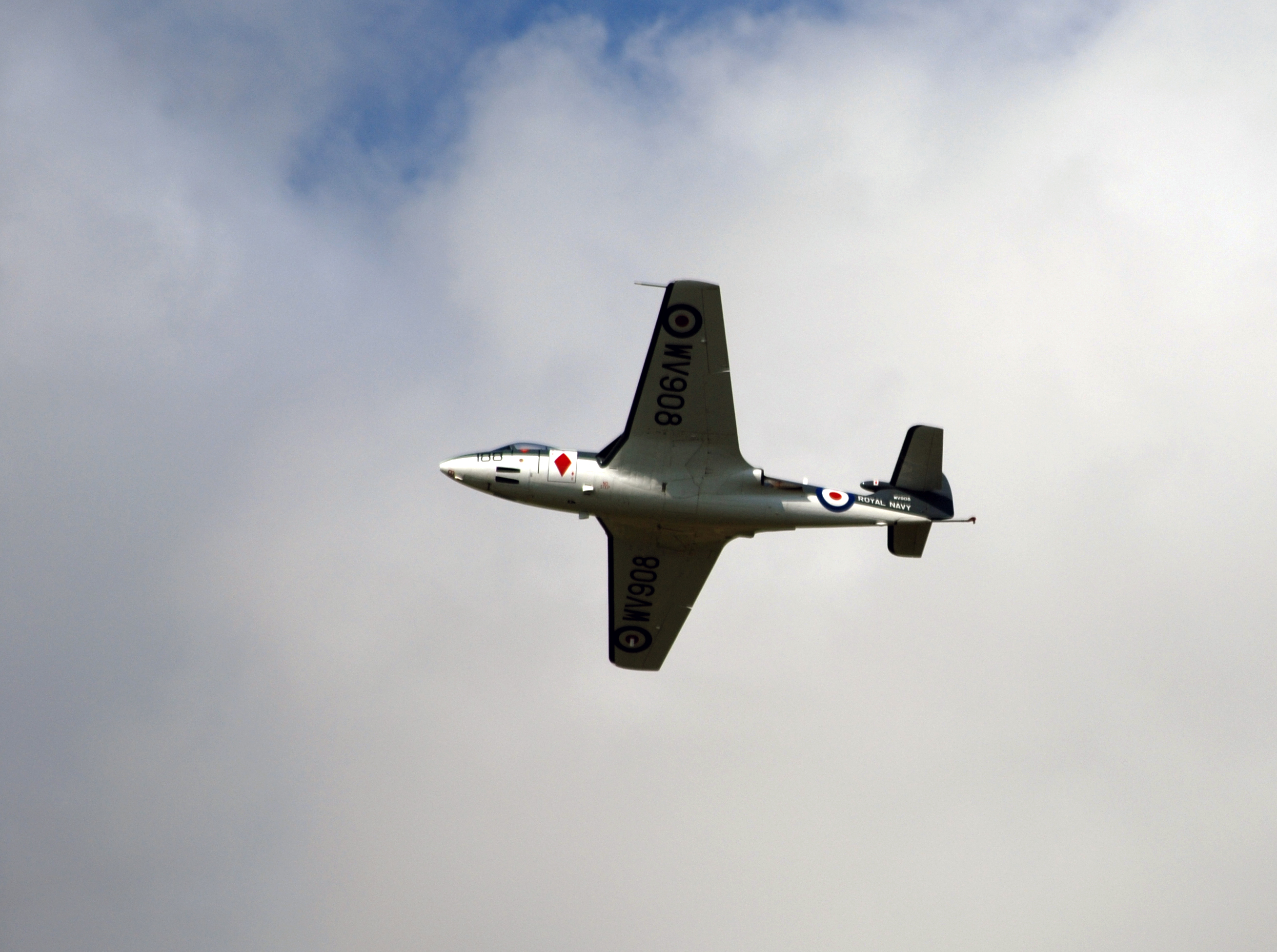 @Shoreham RAFA day 16/9/07